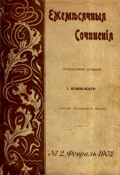 Обложка журнала "Ежемесячные сочинения" 1902 г.